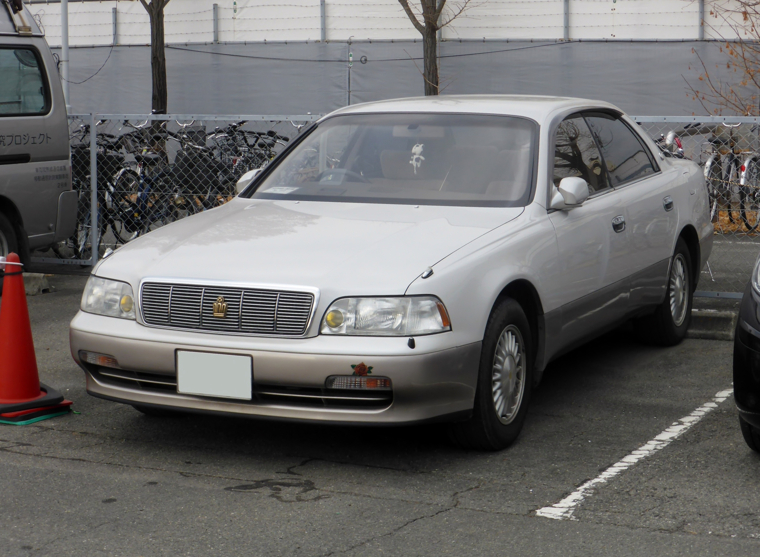 S140型トヨタ・クラウンマジェスタをフロントから撮影。